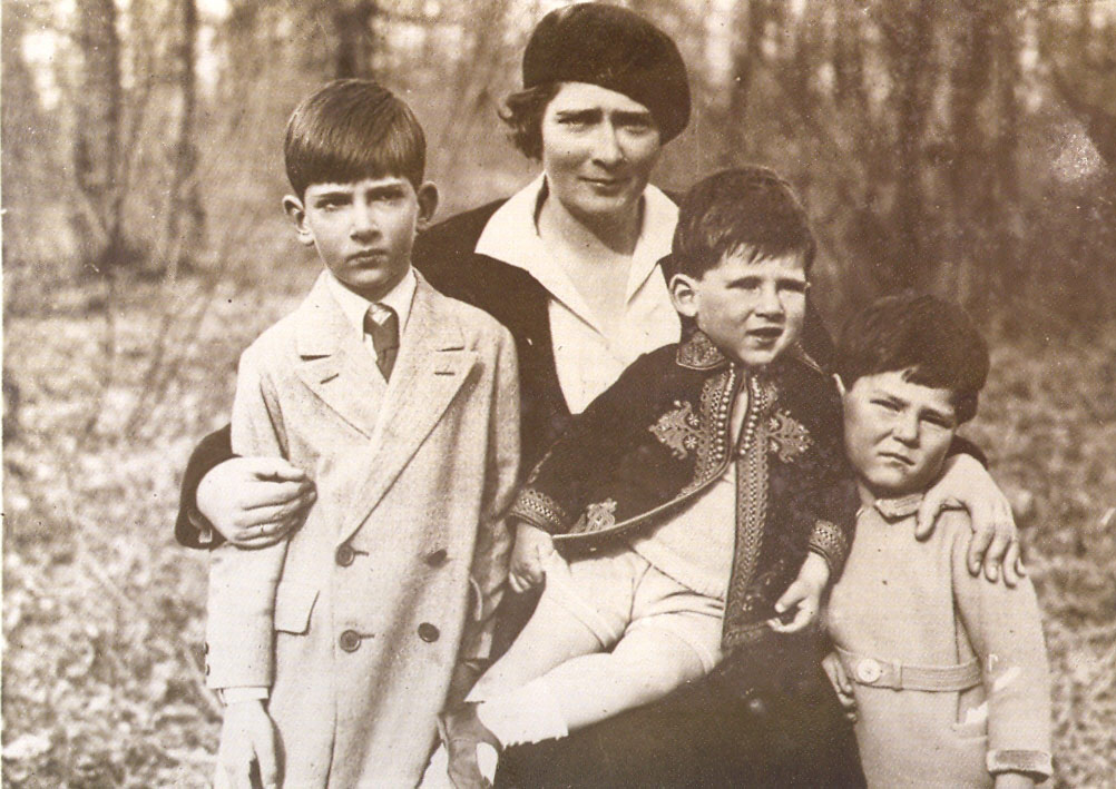 Њ.К.В. Краљица Марија и принчеви Петар, Томислав и Андрија